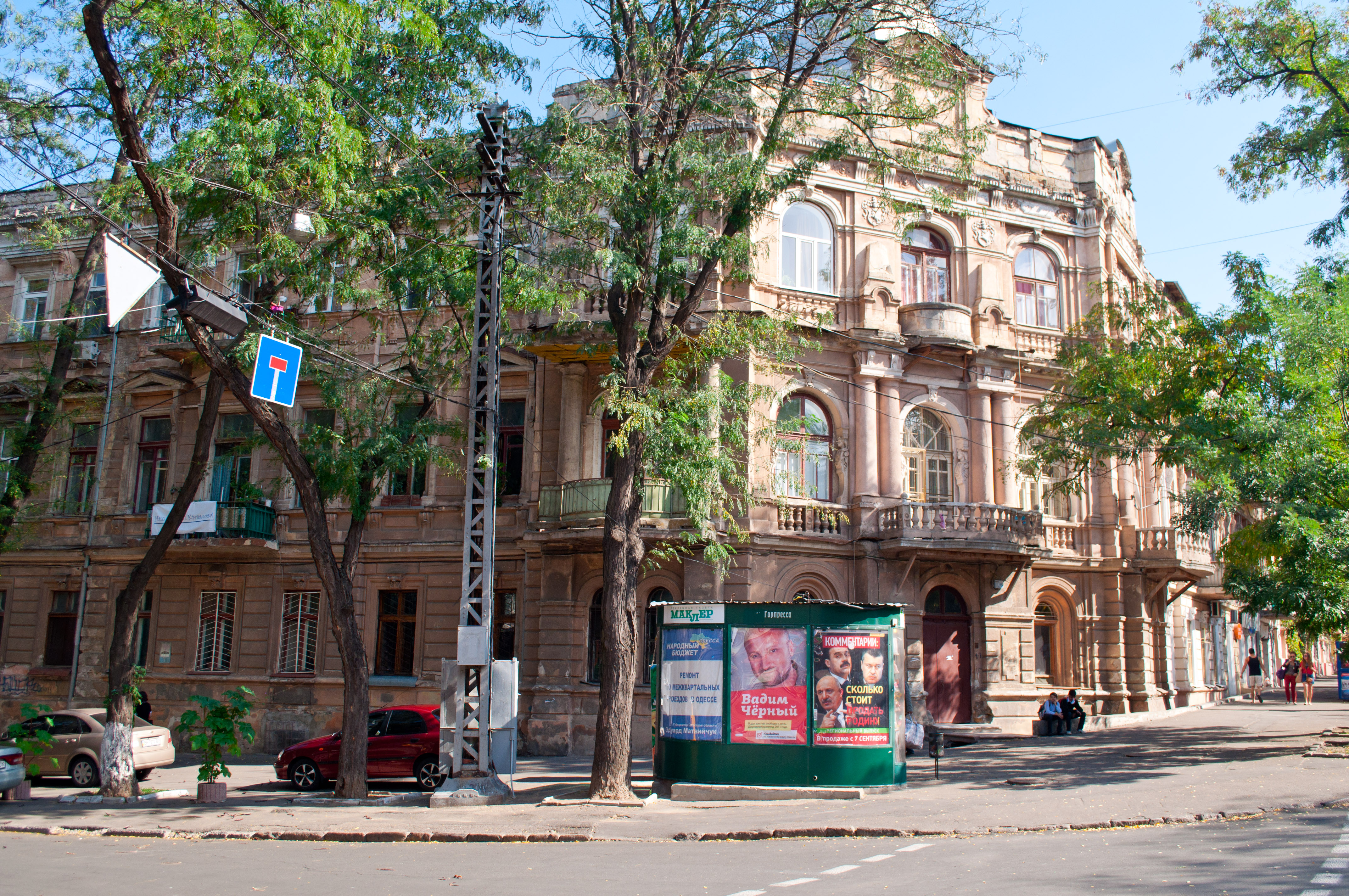 Будинок Скаржинського, 1880-і роки